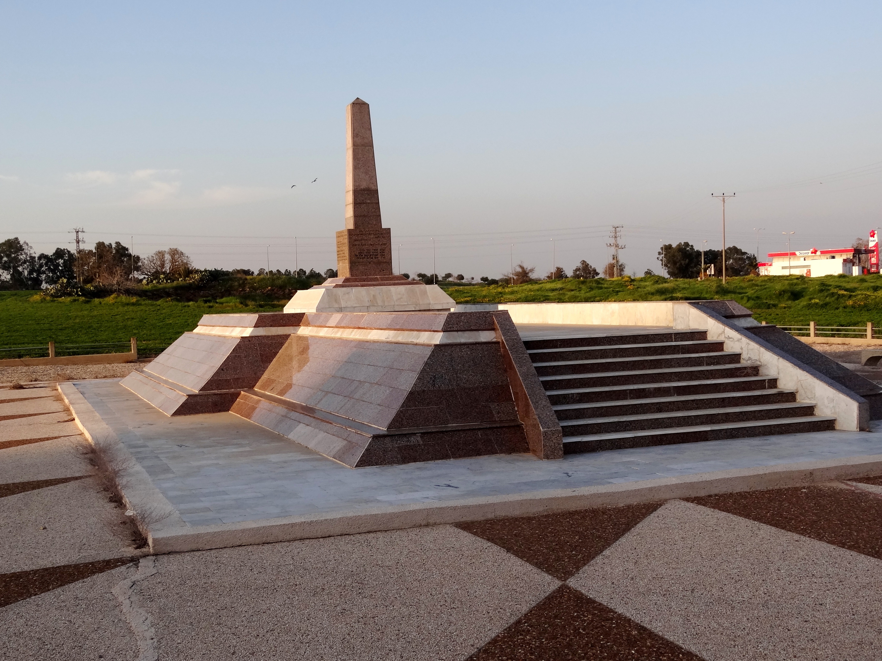 Monument to the memory of four Egyptian soldiers who fell in the battle of Al-Falouja in 1948 אנדרטה לזכר החייל המצרי שהוקמה ליד חמי יואב על כביש 35 מול מצודת יואב לזכר החיילים המצרים שנהרגו בקרב ליד אל פלוג'ה בשנת 1948.